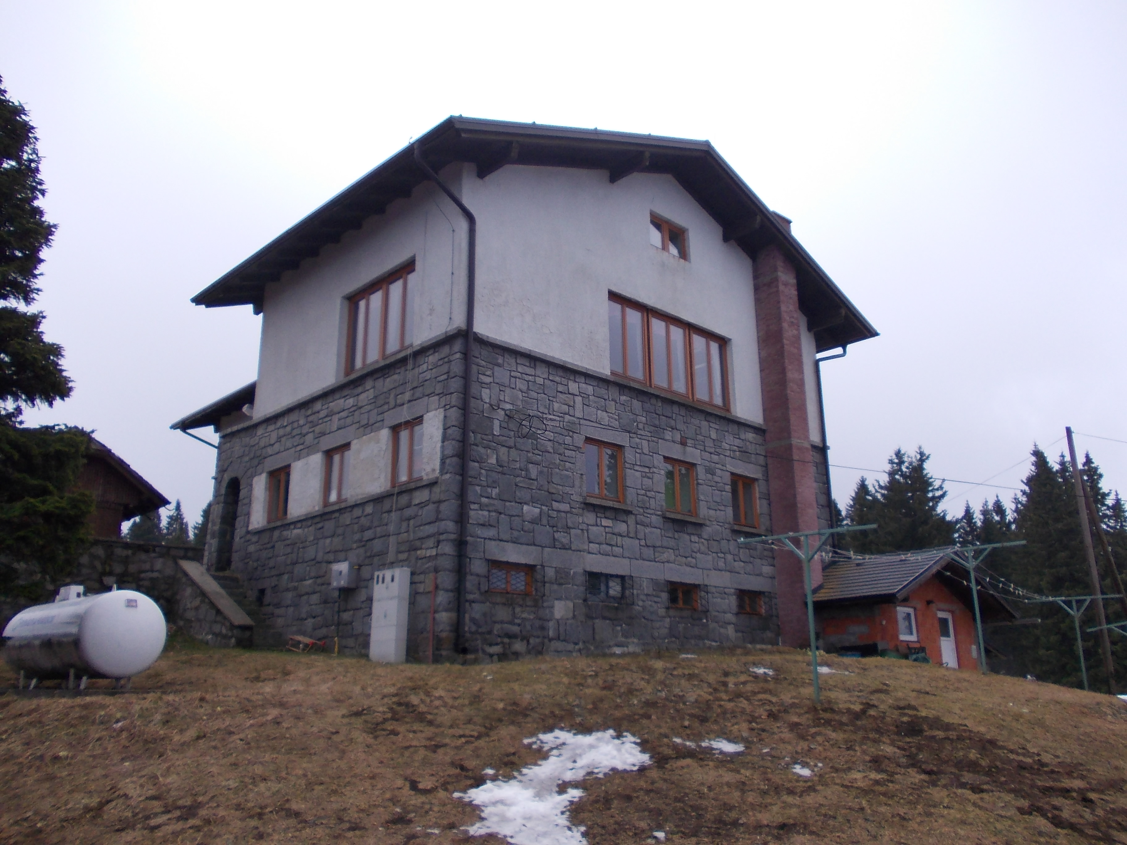 Ribniška koča